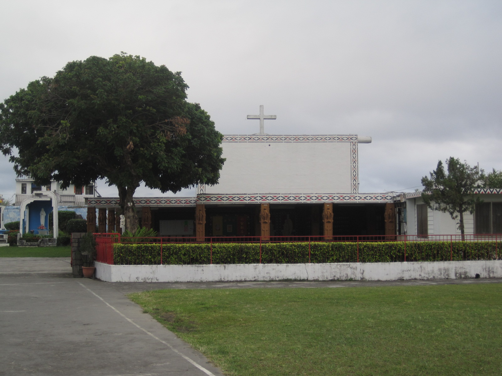 臺東知本天主堂